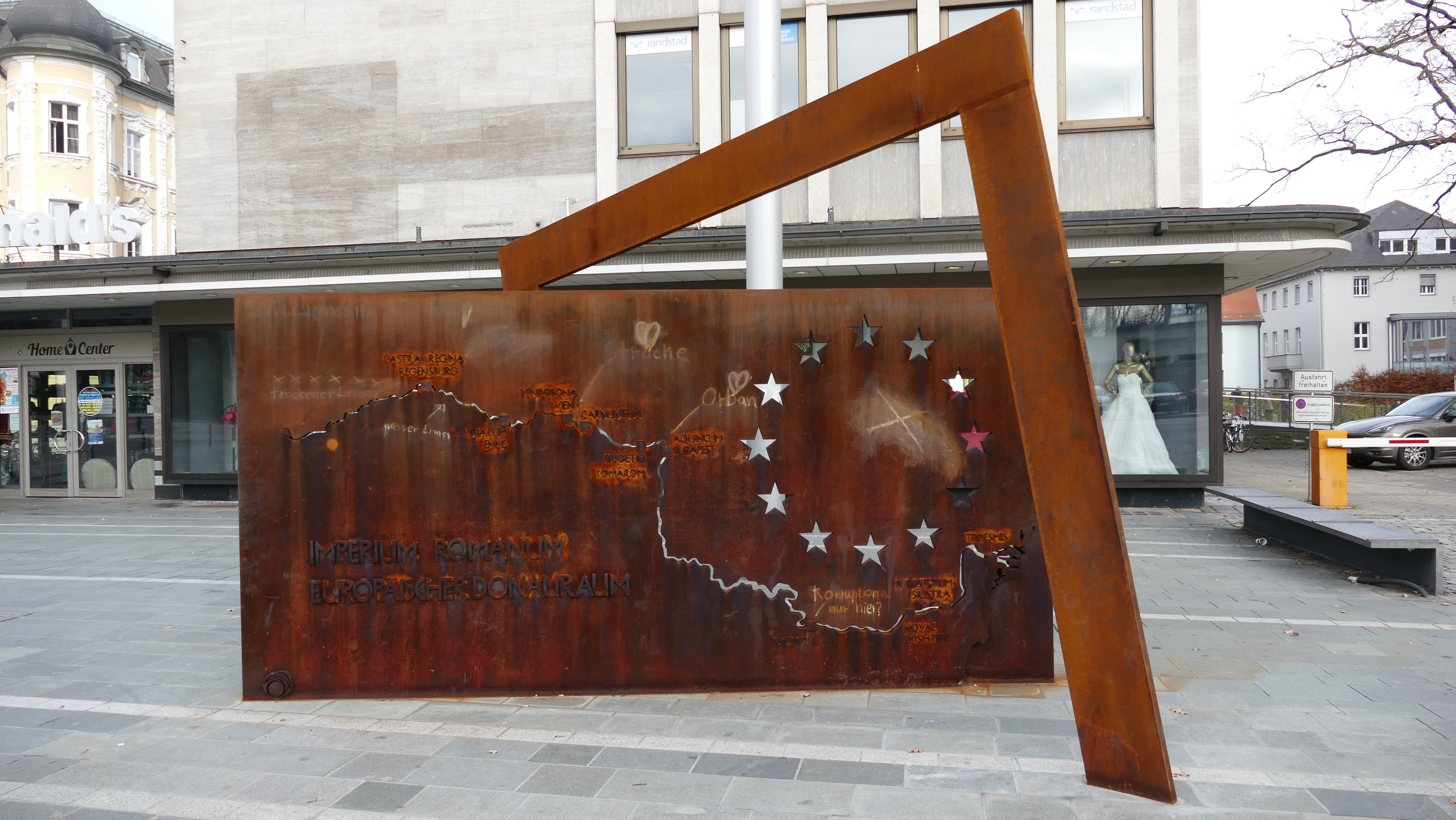 " Römerrastplatz" -Kunstwerk von Paul Schöner am Ernst-Reuter-Platz. Eine Stahlplatte in die der Verlauf der Donau eingefräst ist. Dazu die wichtigen Stationen und Kastelle der Römer.